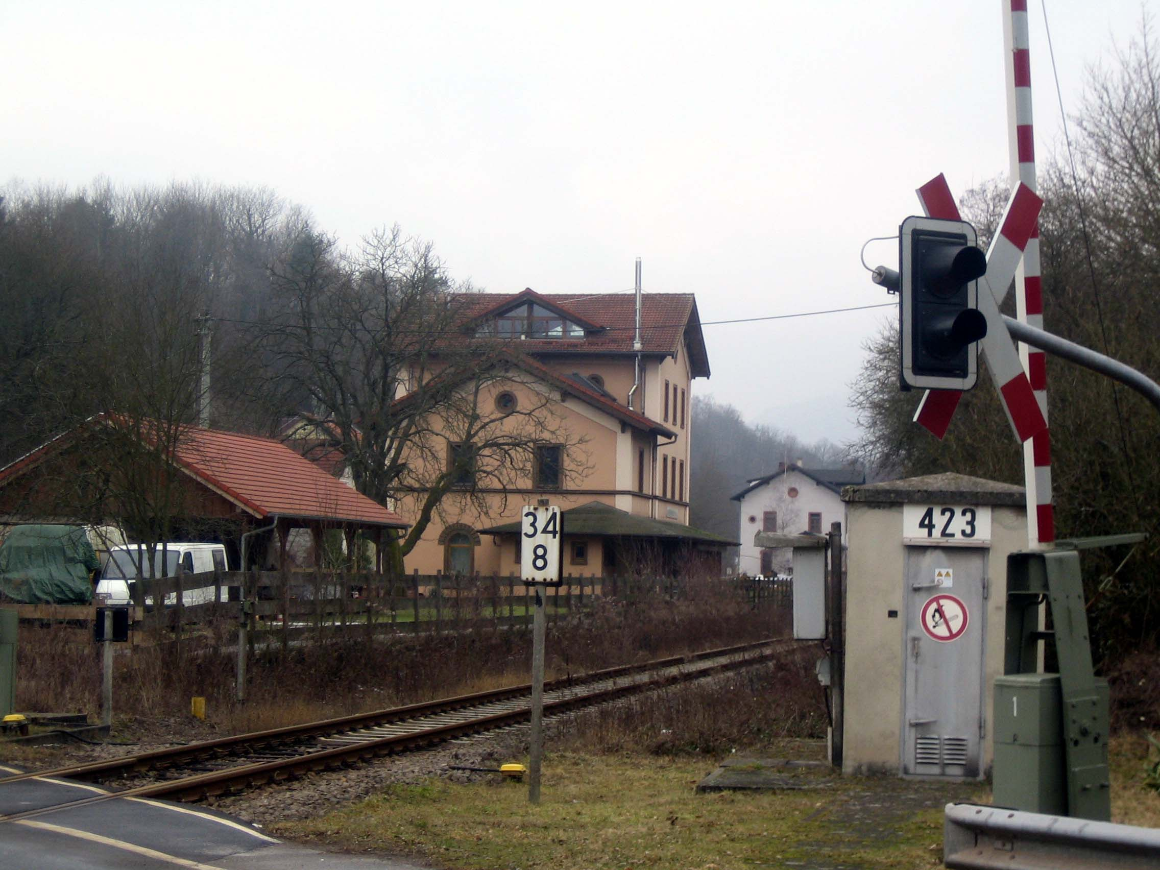 Gebäude des früheren Bf. Albersweiler